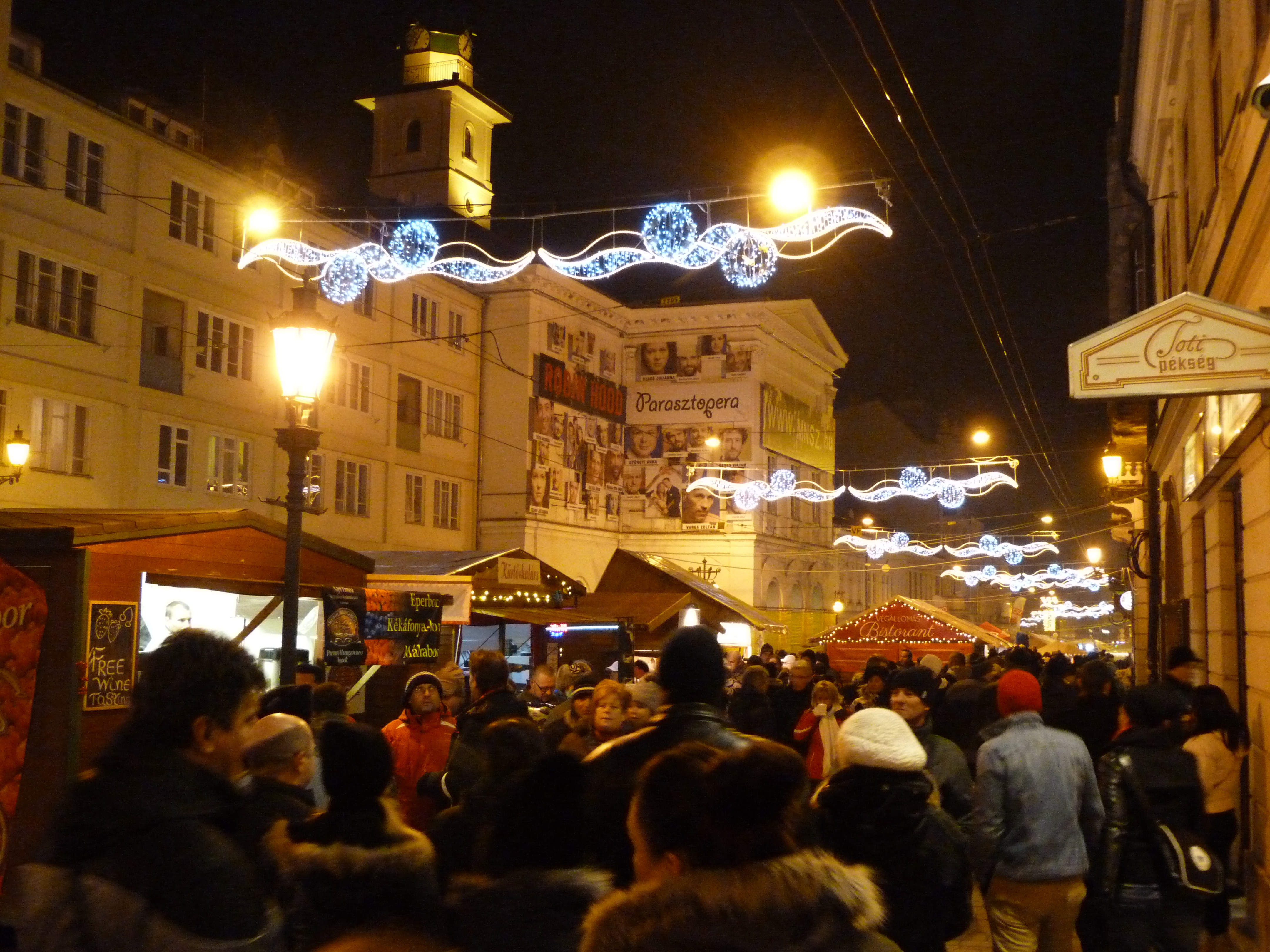 A felvétel 2015. február 7-én szombaton készült Miskolcon. Miskolci Kocsonyafesztivál. ©© Derzsi Elekes Andor, Budapest, 2015, Published in the Metapolisz DVD line. You are authorised to use this photo under Creative Commons – even for commercial, for profit purposes. The vid must be attributed to Derzsi Elekes Andor. All of the photos and vids in the Metapolisz DVD line are under Creative Commons and can be used even for commercial – for profit – purposes. Recommended Citation Derzsi Elekes Andor: Metapolisz DVD line